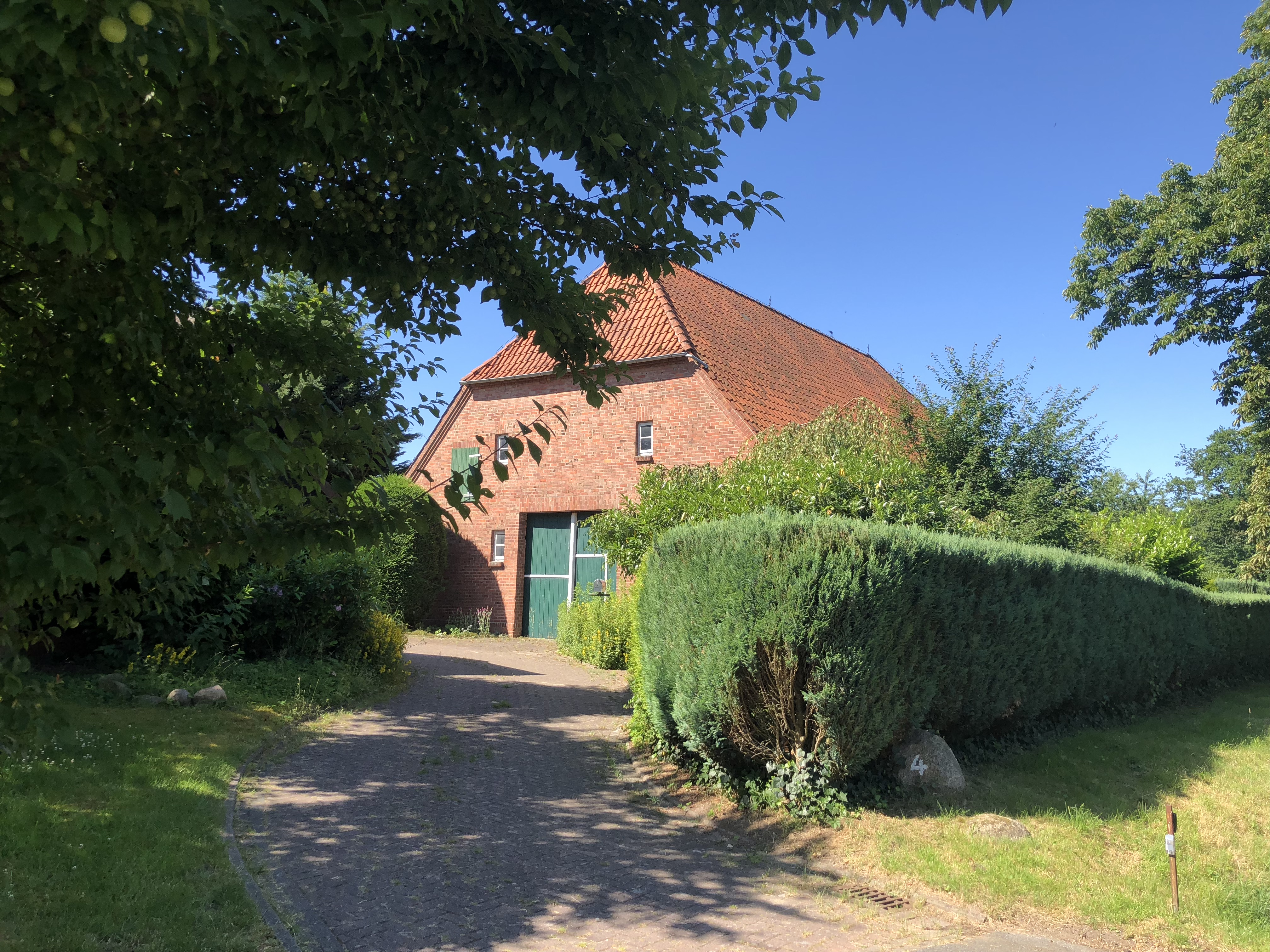 Ehmalig Buurnhuus in Rutenbeek